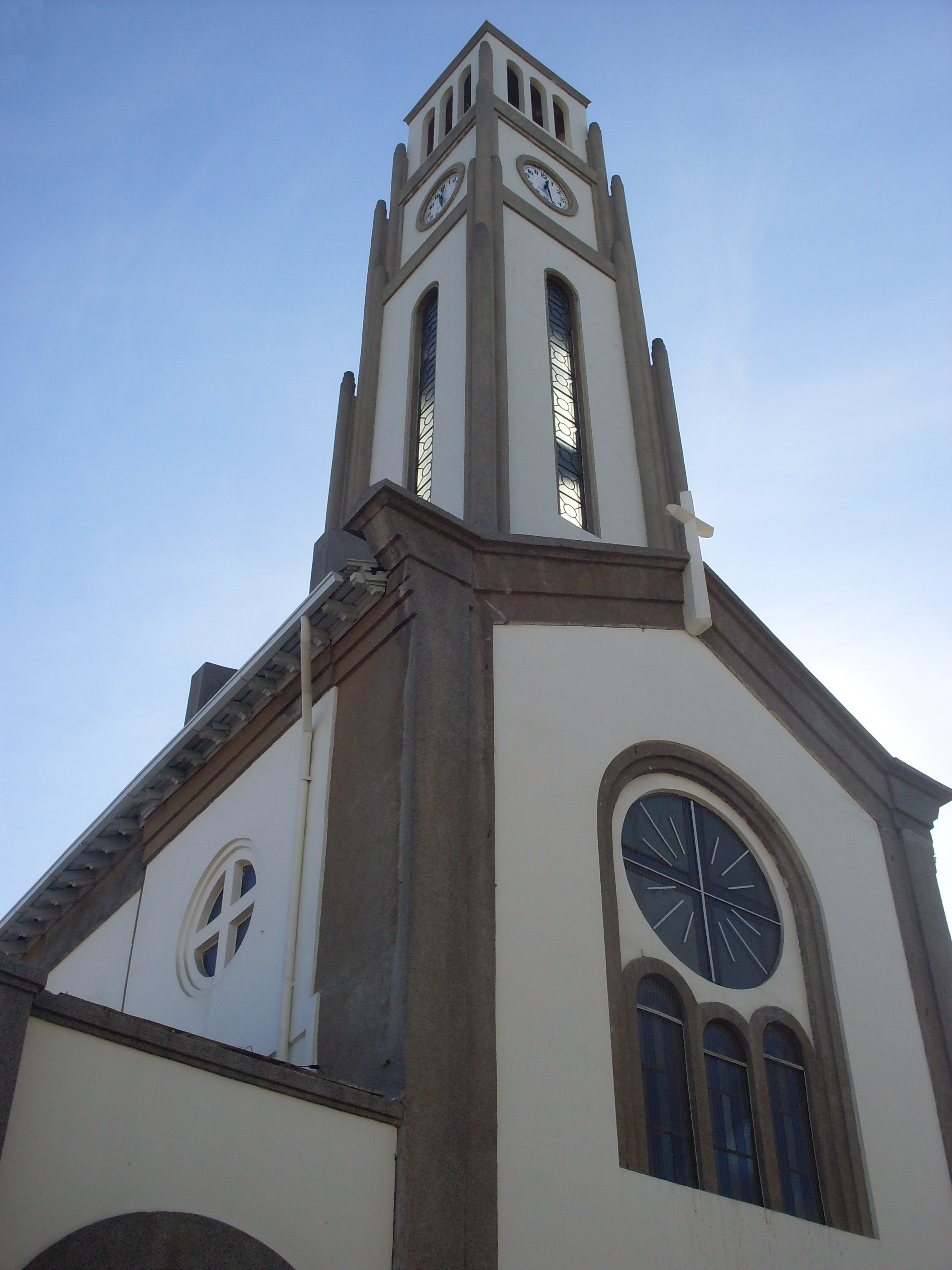 Parroquia de Nuestra Señora del Rosario, ciudad de Quilpué, Chile. El ángulo de captura permite observar el campanario de la iglesia.